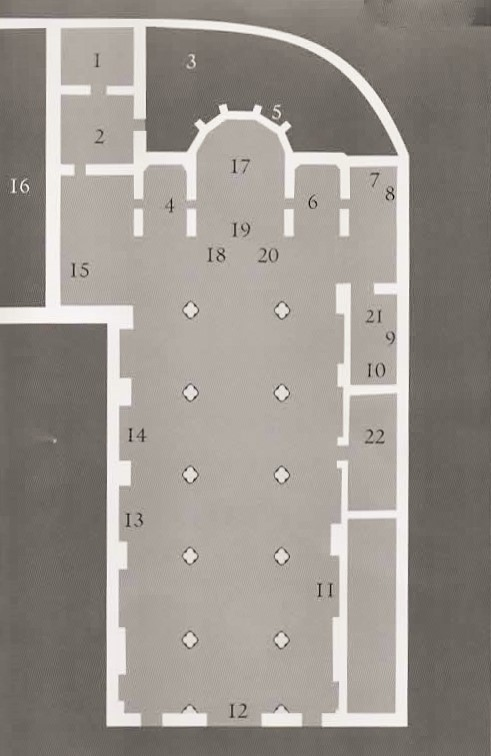 Iglesia Santo Domingo-Elvas. Plano de planta